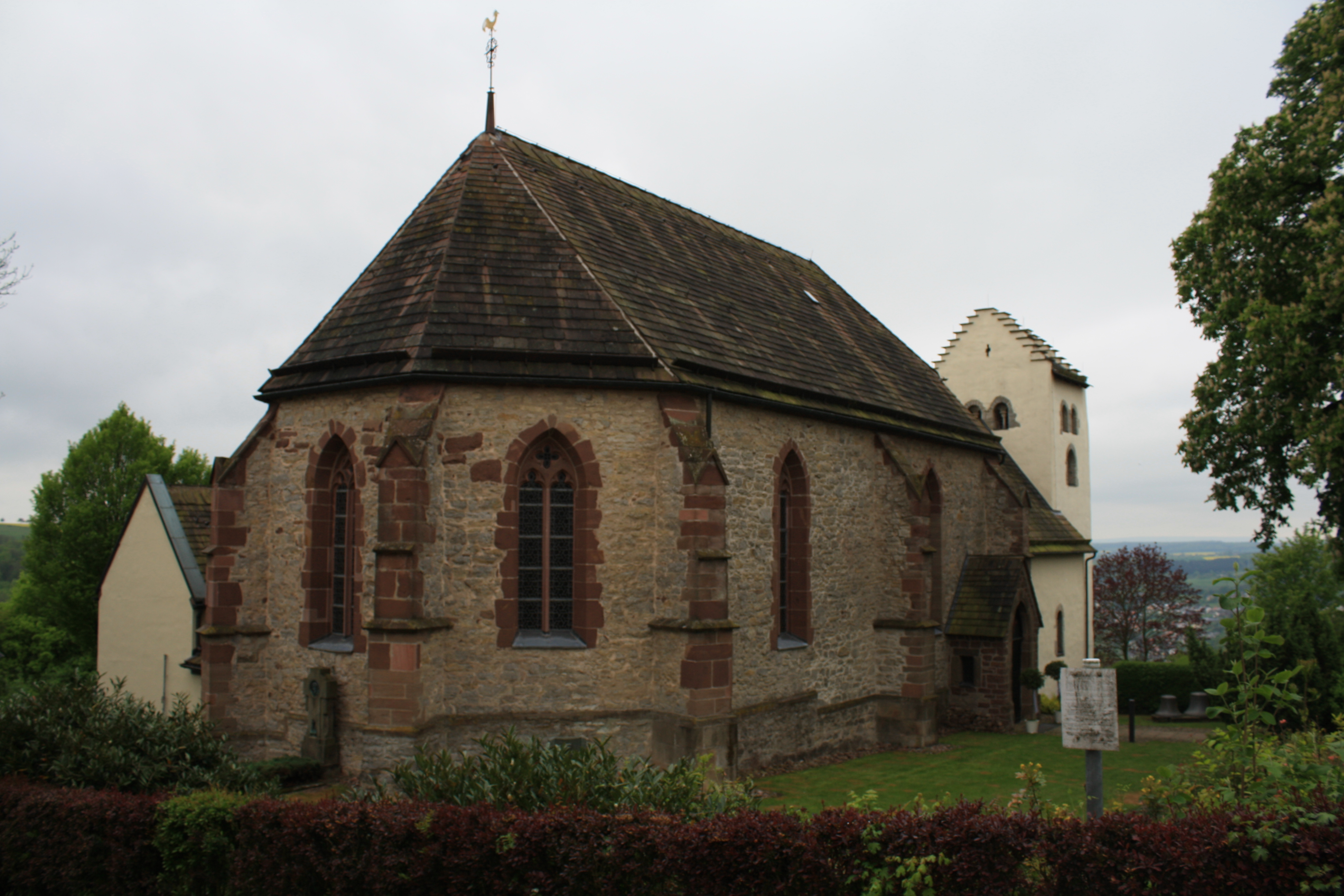 Jakobsberg